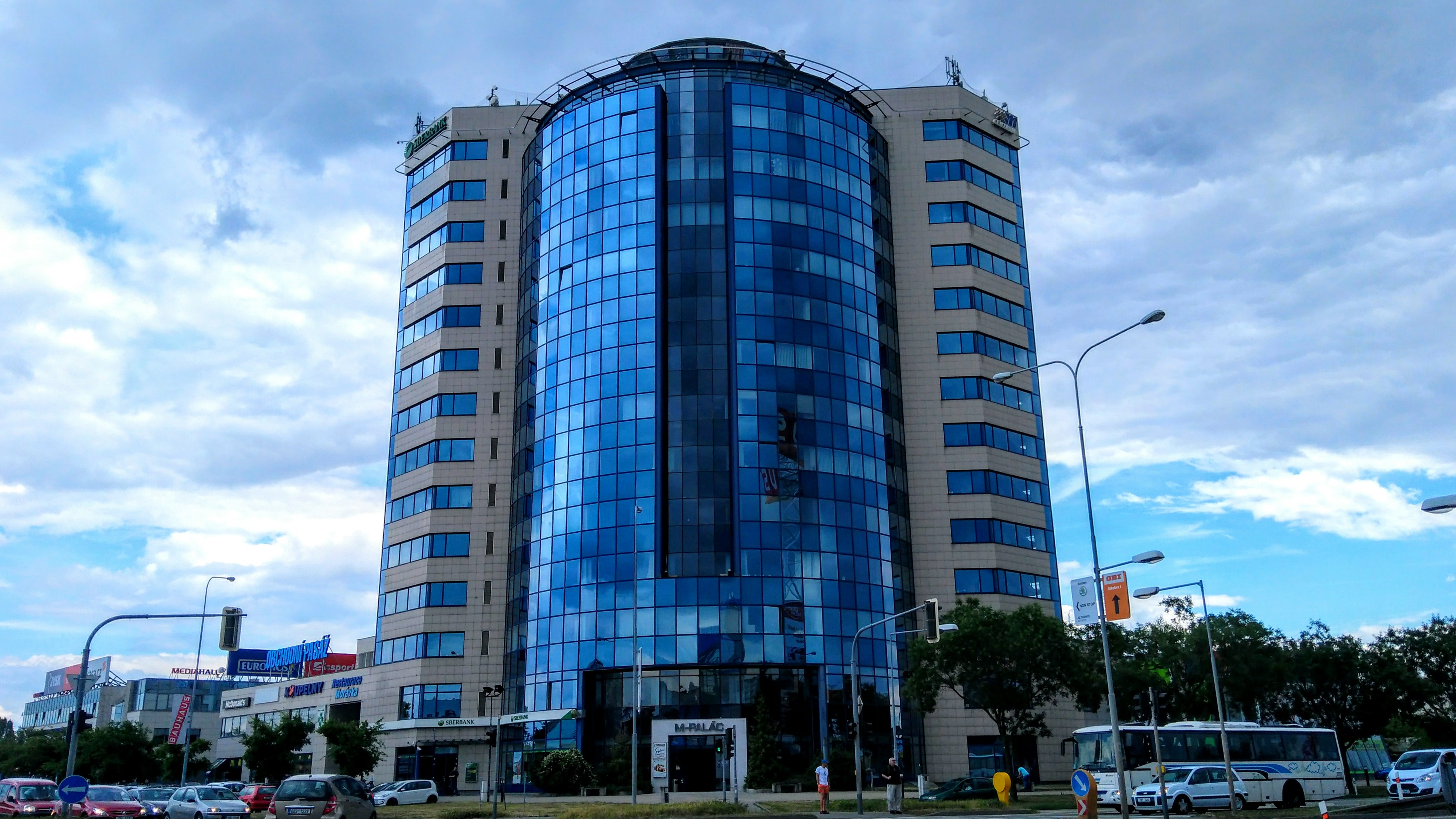 Výšková budova.